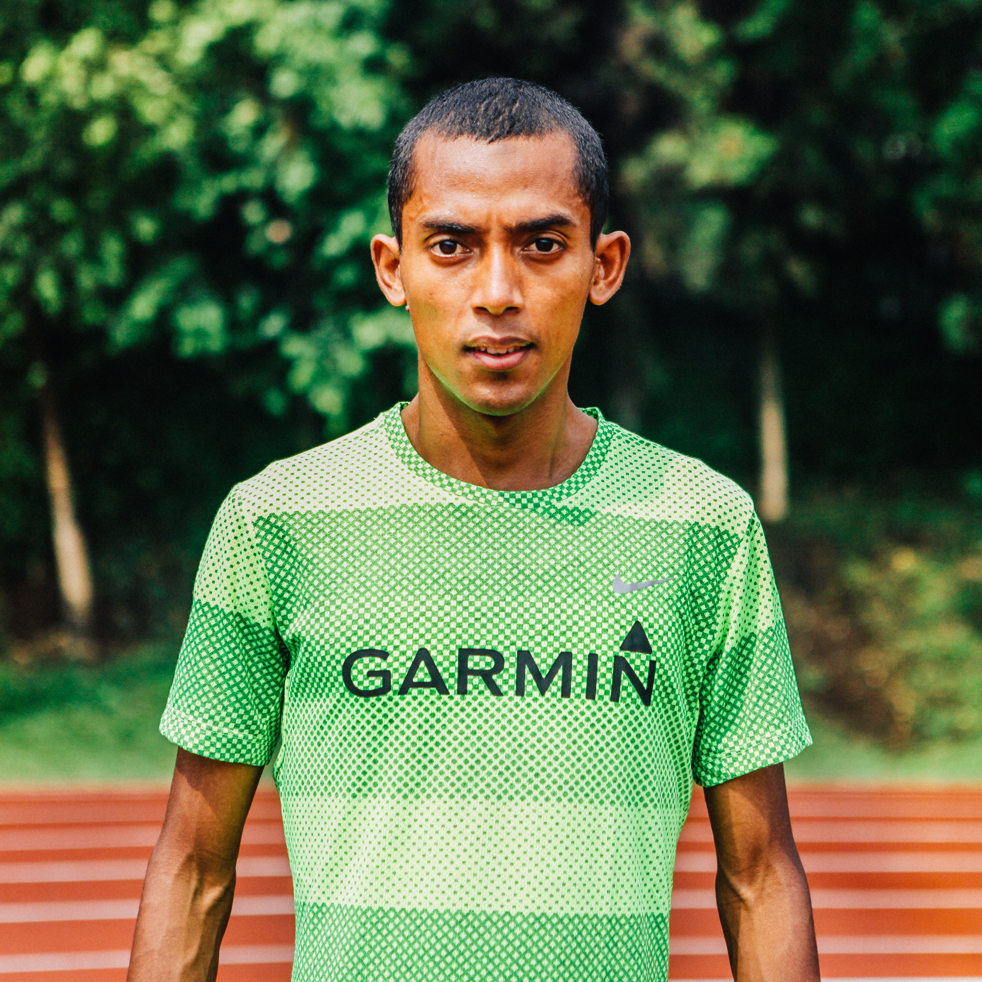 Nama Lengkap: Agus Prayogo Tempat, Tgl Lahir: Bogor, 23 Agustus 1985 Asal: Indonesia